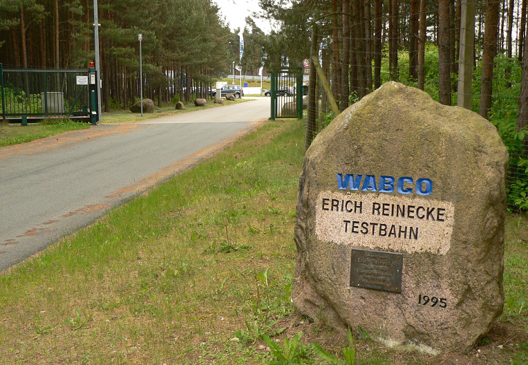 WABCO-Teststrecke (Erich Reinecke Testbahn) in Jeversen, Wietze